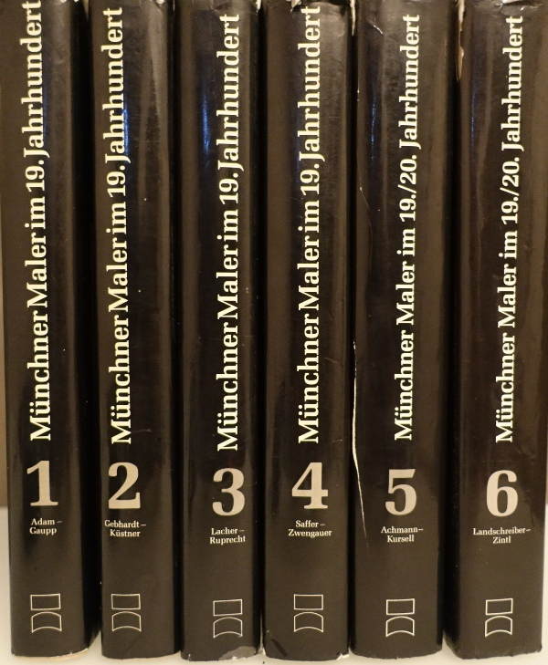 Lexikon der Müncher Kunst in sechs Bänden